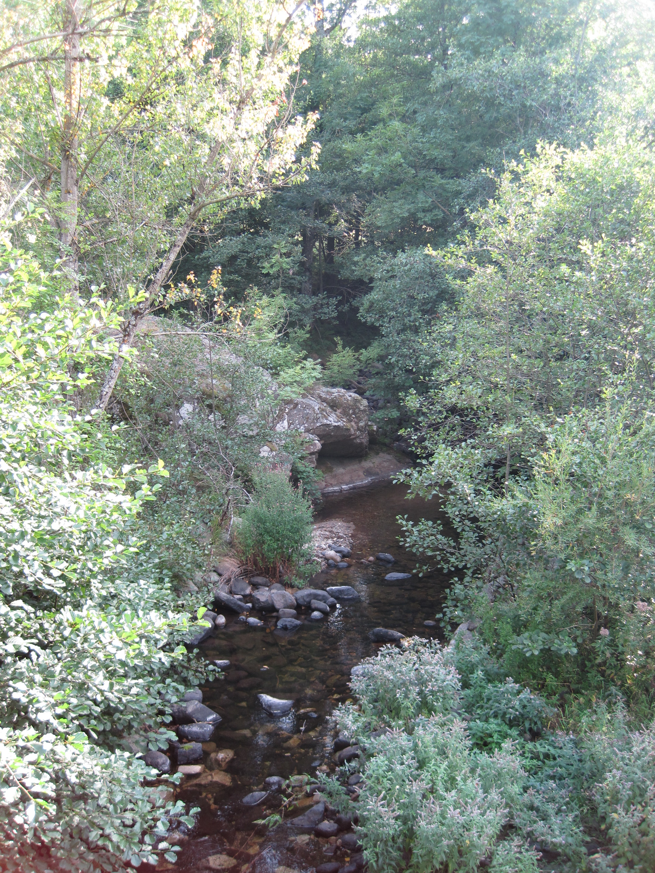 La Rimande, rivière de Saint-Julien-d'Intres, 07310 France